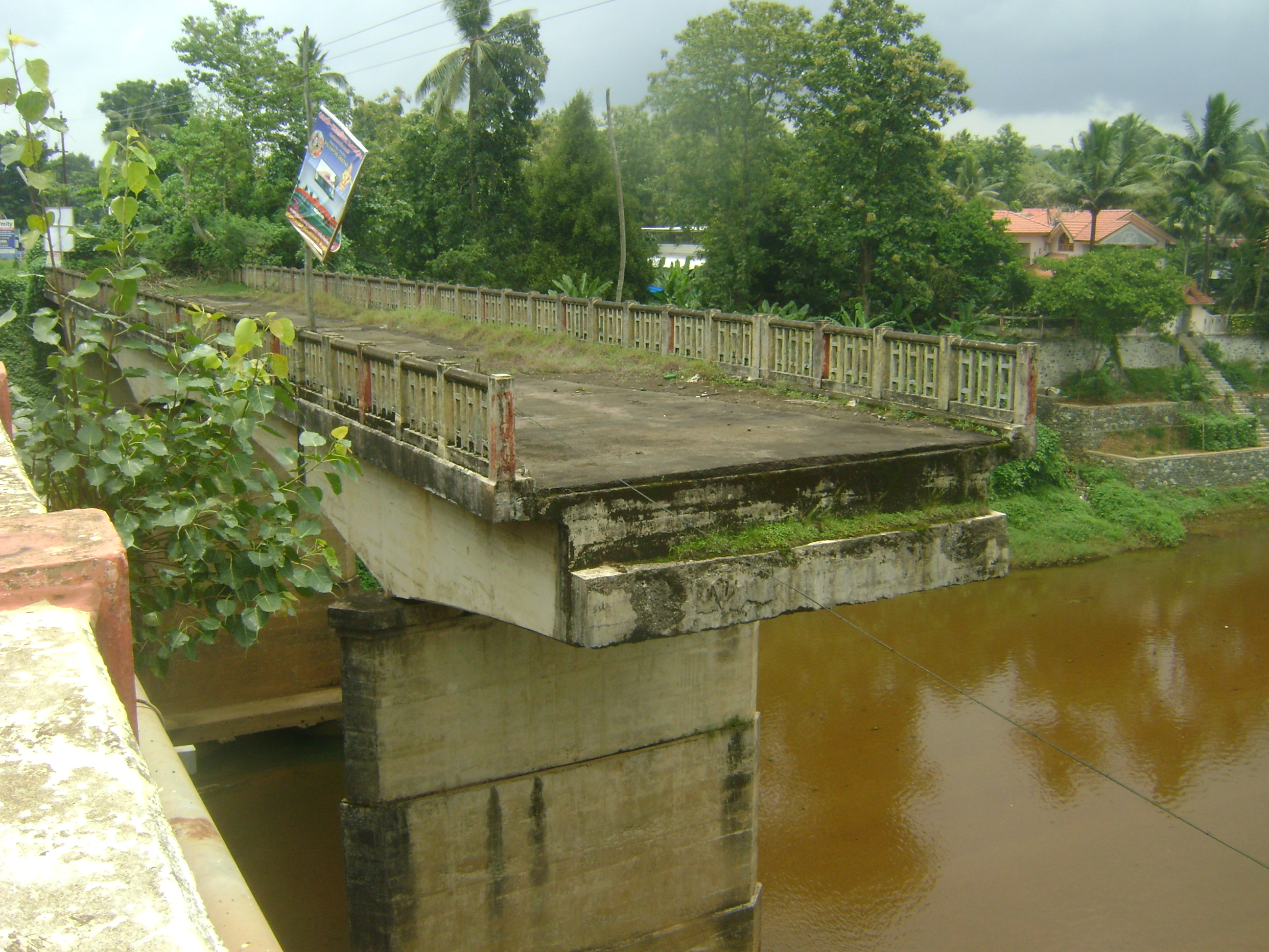 തകർന്ന റാന്നി പാലത്തിന്റെ ഭാഗം